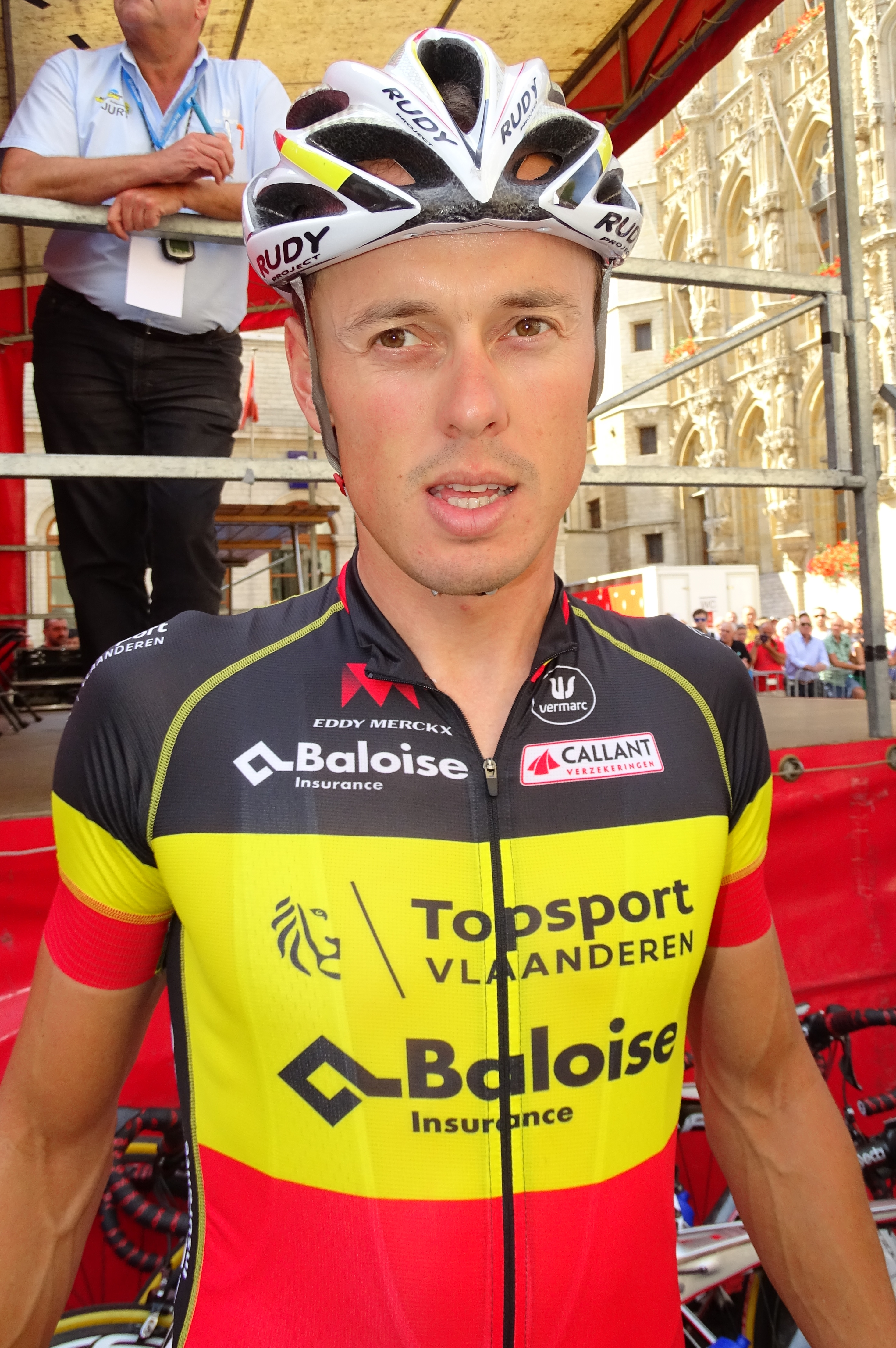 Reportage réalisé le dimanche 23 août à l'occasion du départ et de l'arrivée du Grand Prix Jef Scherens 2015 à Louvain, Belgique.